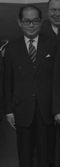 서독을 방문 중인 김성용(金星鏞) 국회의원